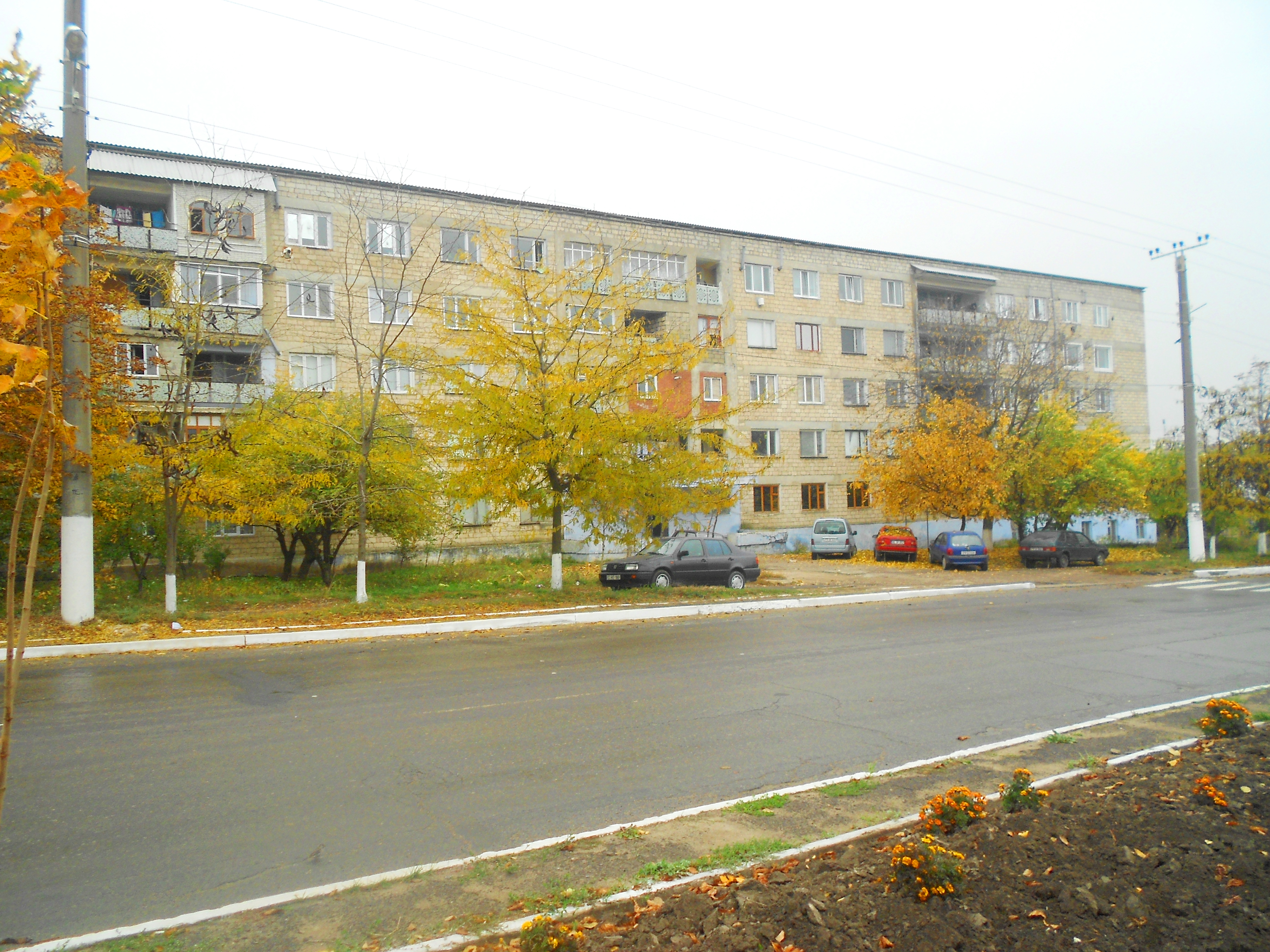 Bloc locativ în Florești